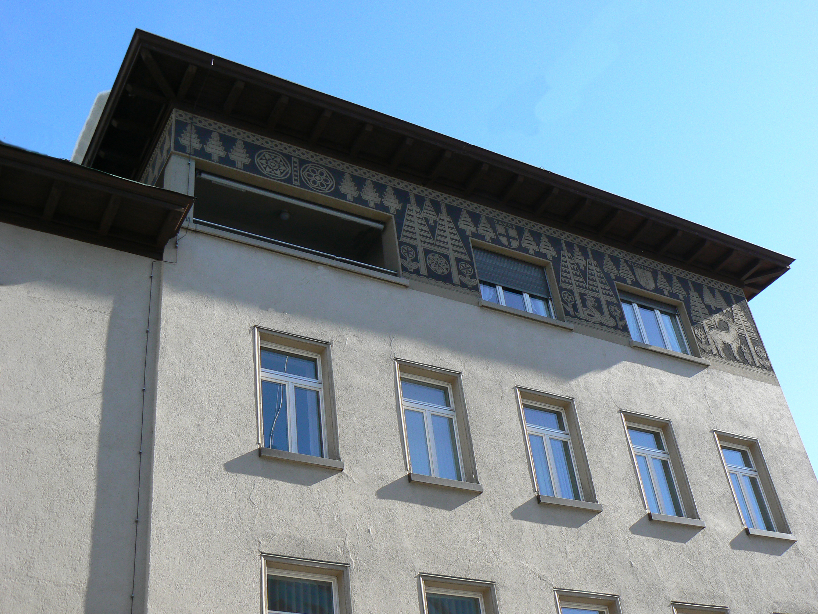 Das Bildwerk zeigt die Geschichte der Post und des Reisens von ihren Anfängen bis zur damaligen Gegenwart auf durchaus humorvolle Art.